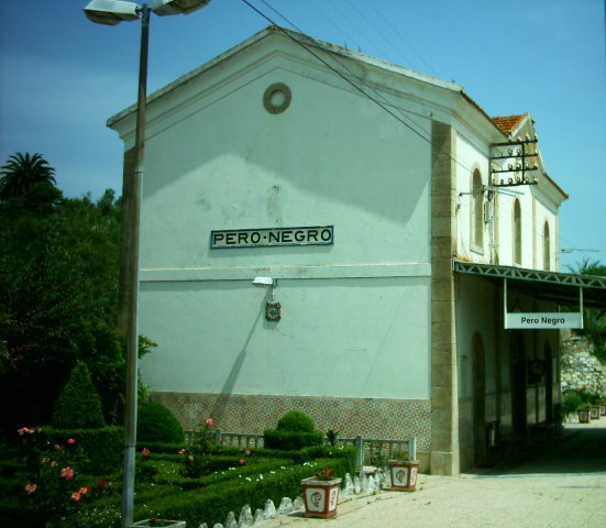 Estação ferroviária de Pero Negro